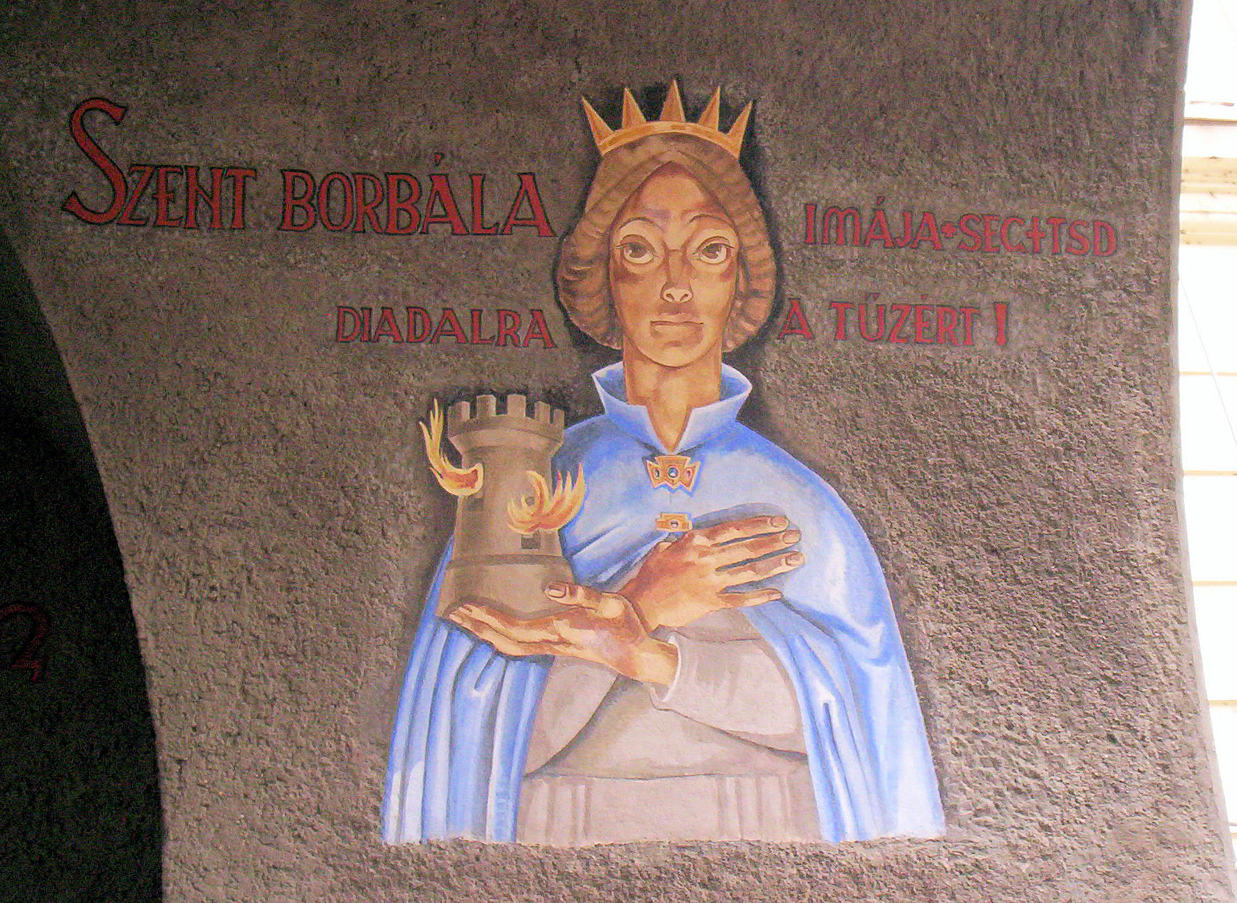 Szent Borbála. A szegedi Hősök kapuja (Porta Heroum) freskója. Festette Aba-Novák Vilmos Stefán Henrik segédletével, 1937-ben. – photo taken by uploader User:Csanády in 2006.